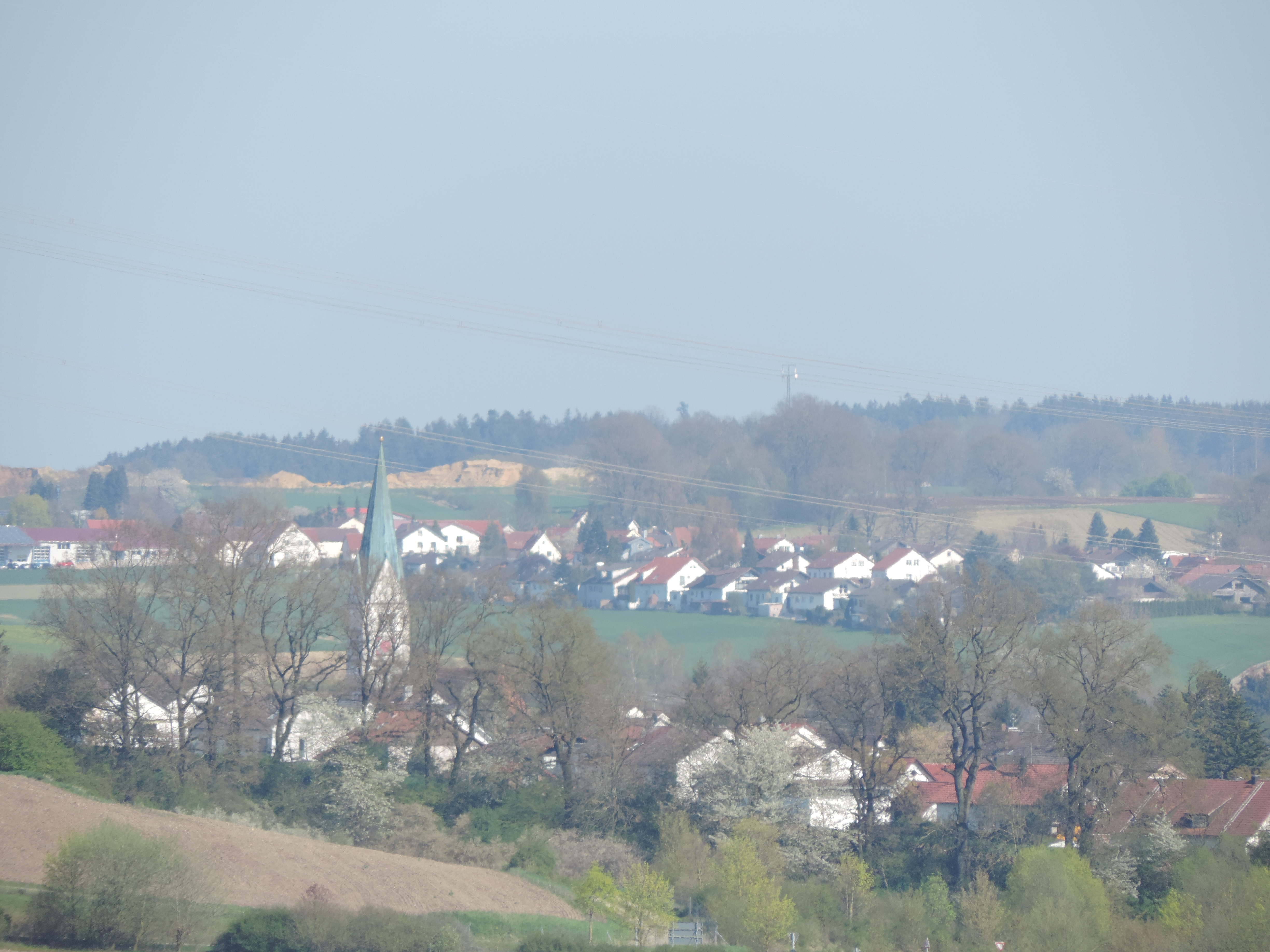 von Wegkapelle Unterzell